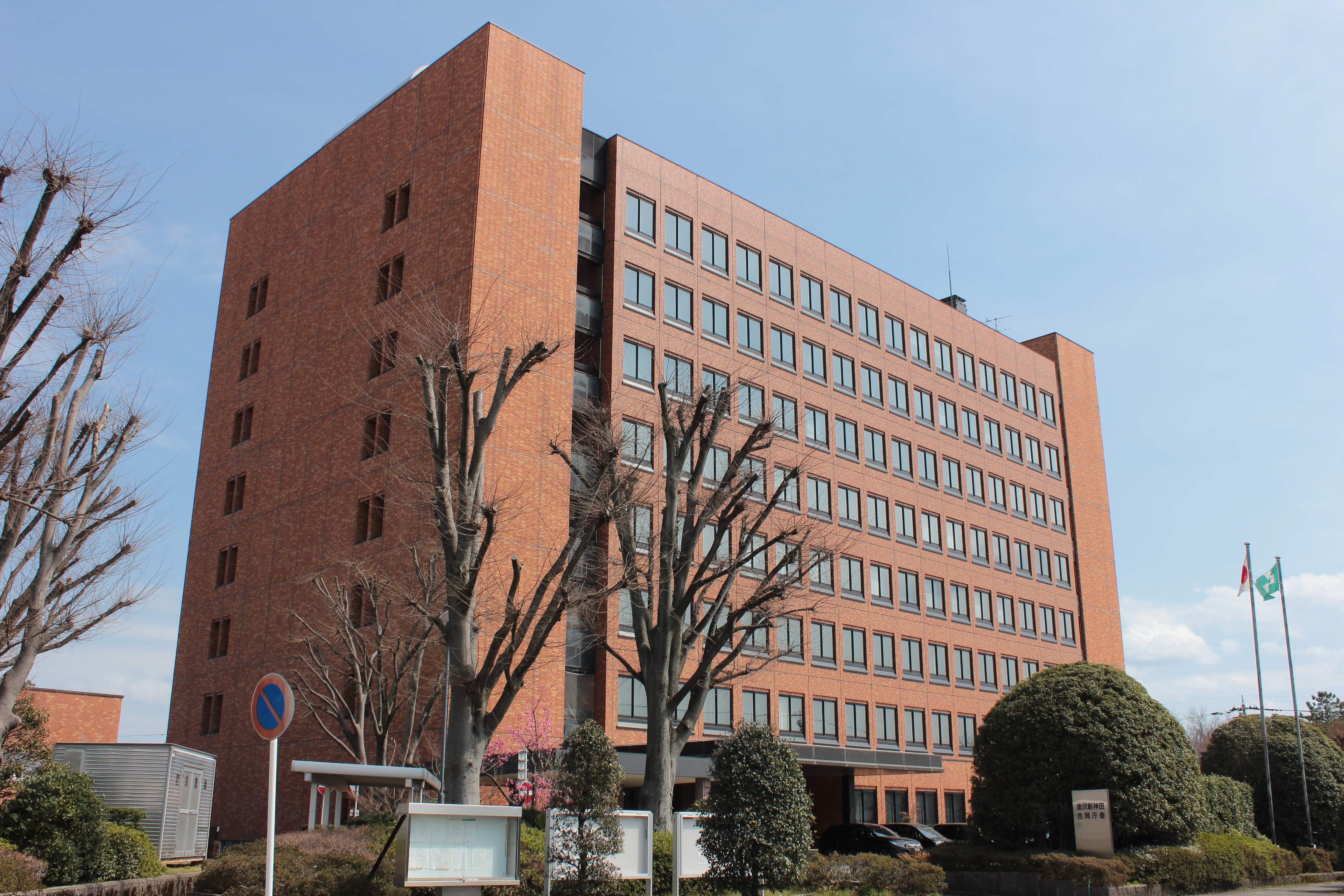 金沢新神田合同庁舎（石川県金沢市新神田）。北陸財務局、金沢地方法務局、石川地方協力本部などが入居している。また、金沢市の新神田市民センターも併設されている。 Canon EOS Kiss X5